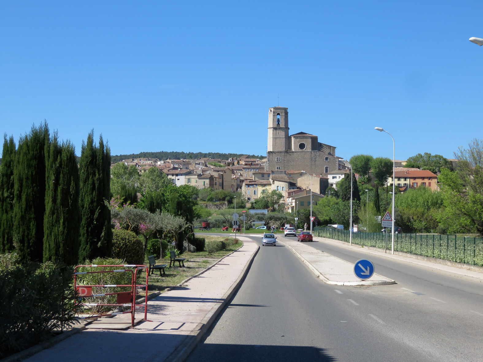 Lorgues